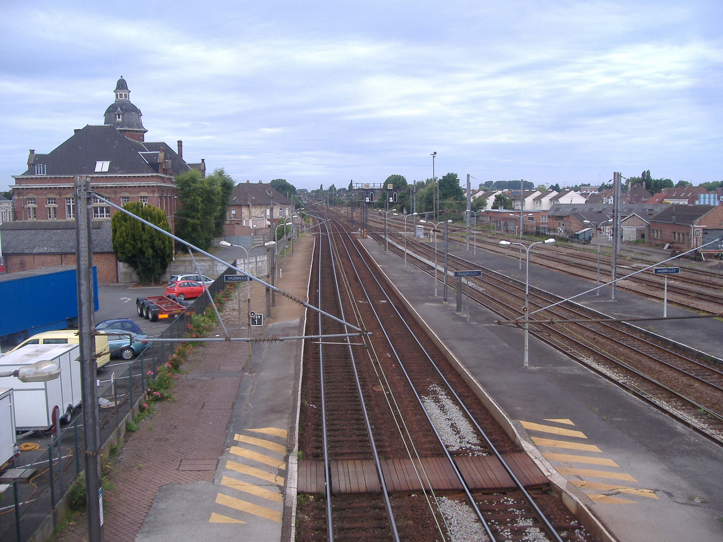 Gare de Hazebrouck, Nord, Nord-Pas-de-Calais, France.